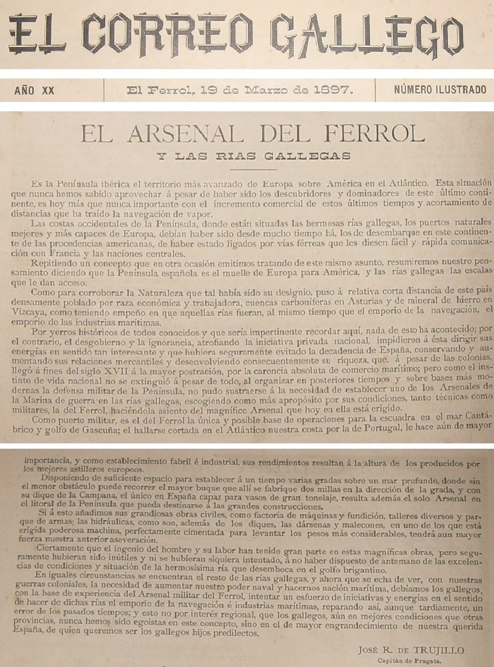 Artículo sobre el role que el Ferrol y las Rías Gallegas deberían desempeñar en la península Ibérica y el continente europeo publicado por el diario ferrolano El Correo Gallego con fecha 19 de Marzo de 1897. Sorprendentemente, en la actualidad, es precisamente el role que en este articulo se describe el que debería desempeñar el nuevo superpuerto ferrolano en el contexto de la Unión Europea. De manera que, a pesar de haber sido redactado y publicado hace más de un siglo, sigue teniendo una actualidad total.